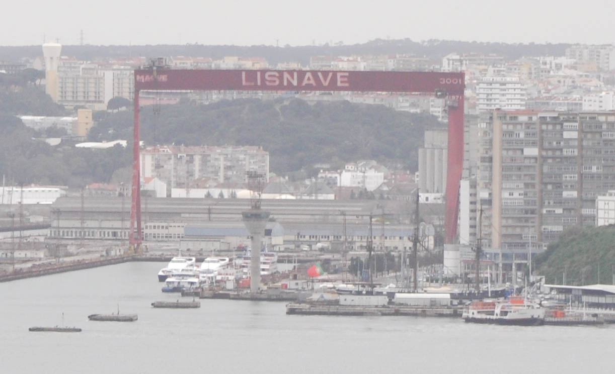 Lisnave